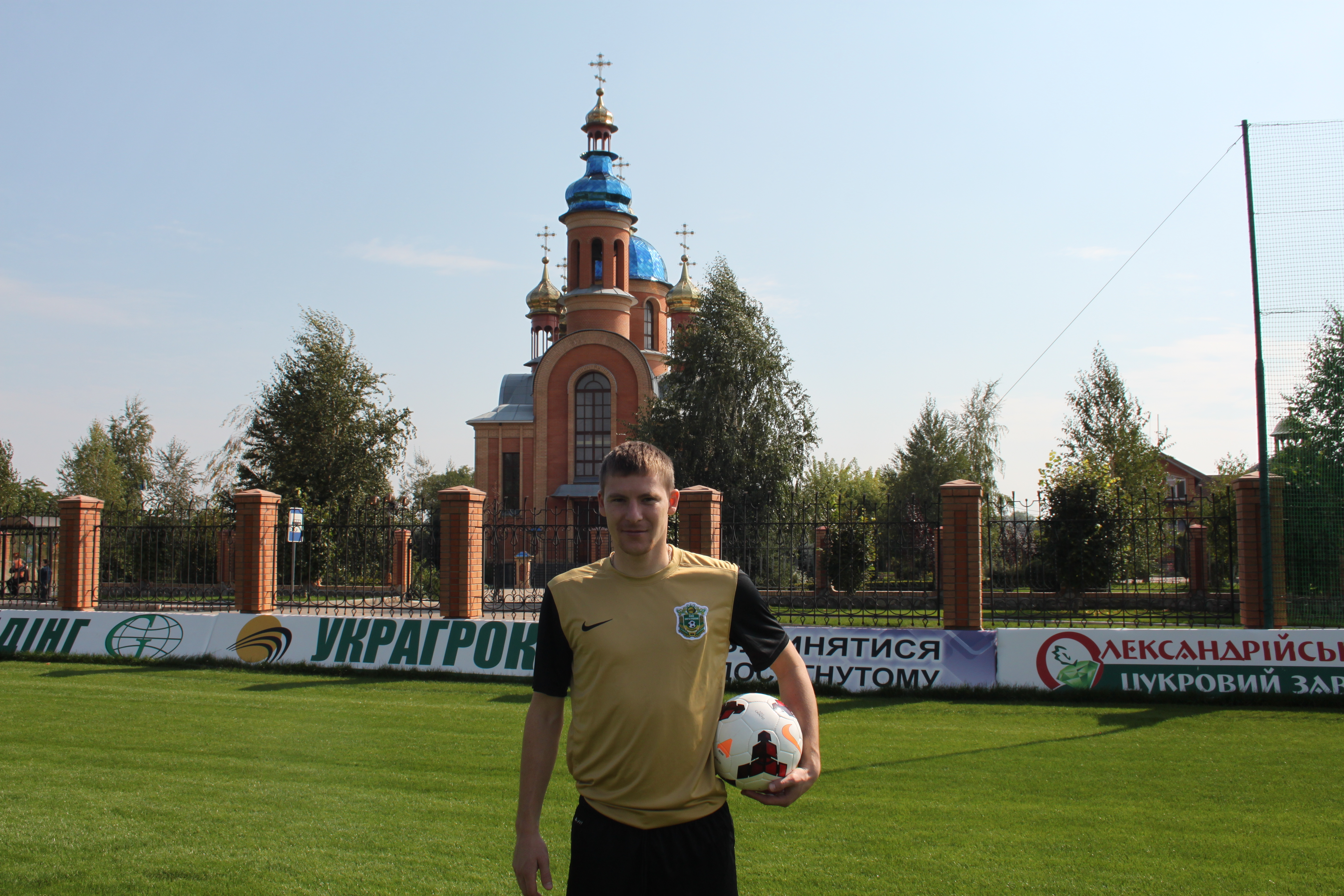 Євген Лозовий